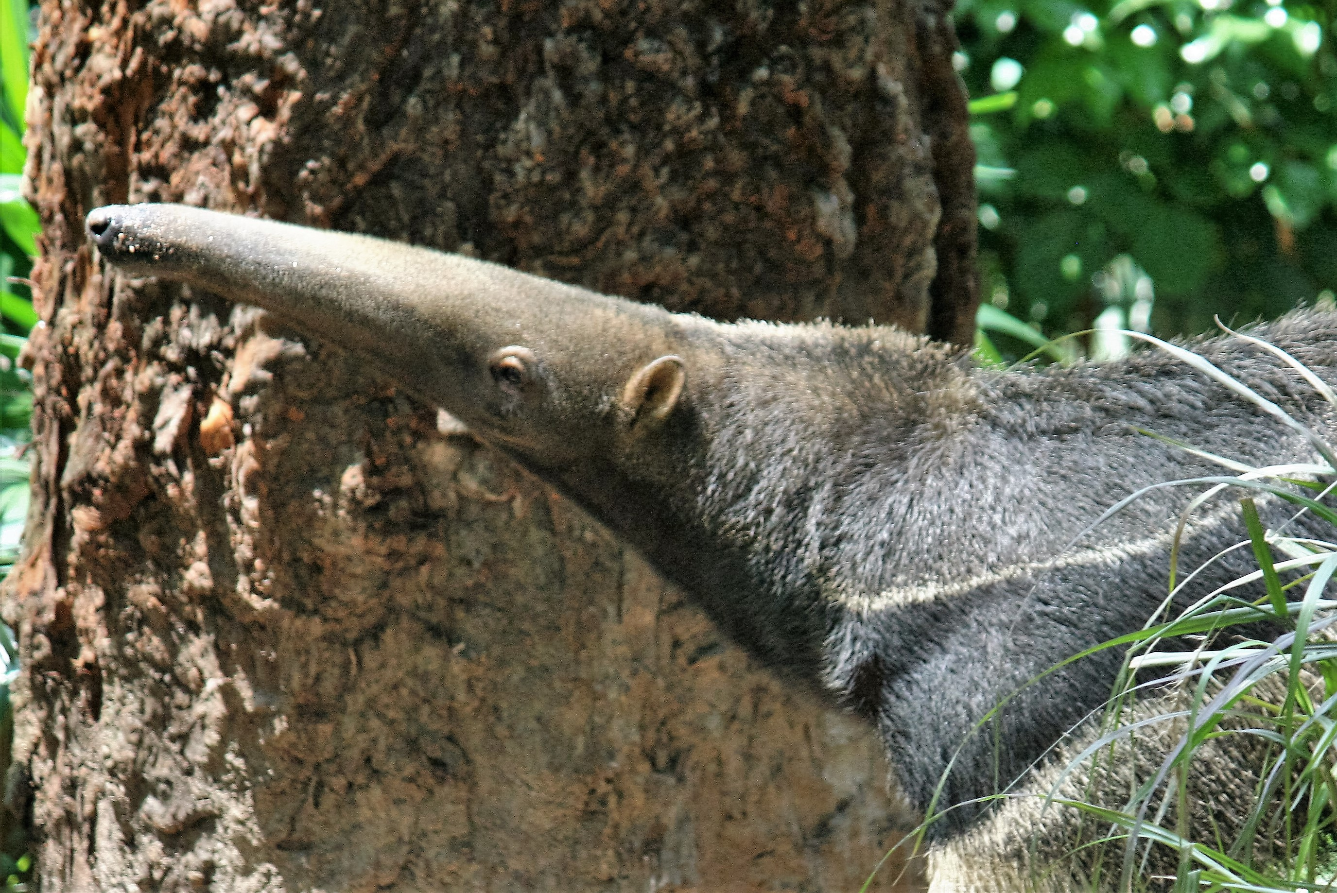 Zoo Guangzhou